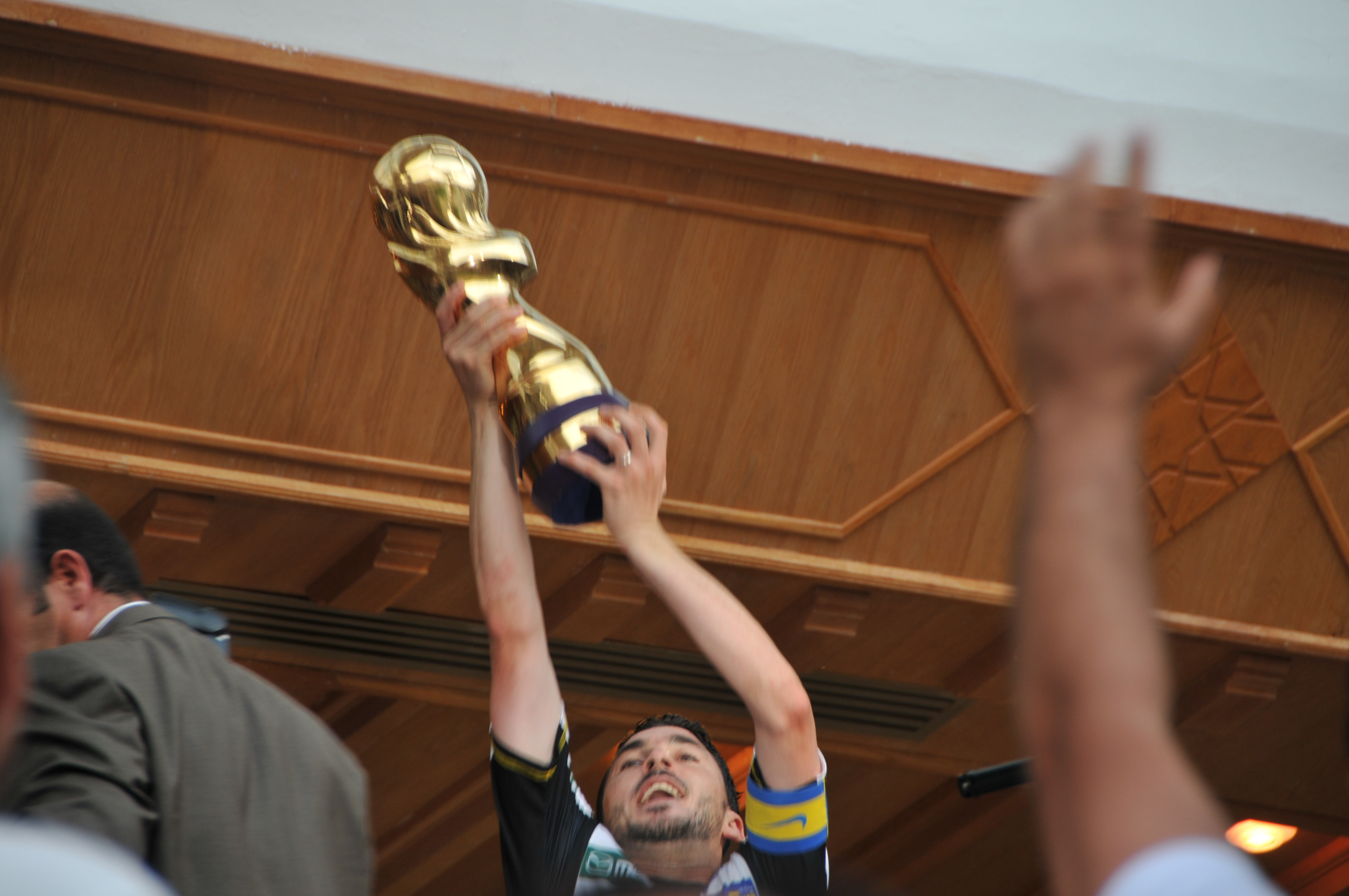 Sami Merdassi, capitaine de l'CSS brandissant la coupe de tunisie de football en 2009